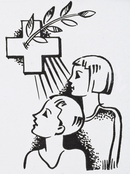 Logo der Kinderhilfe des Schweizerischen Roten Kreuzes um 1942